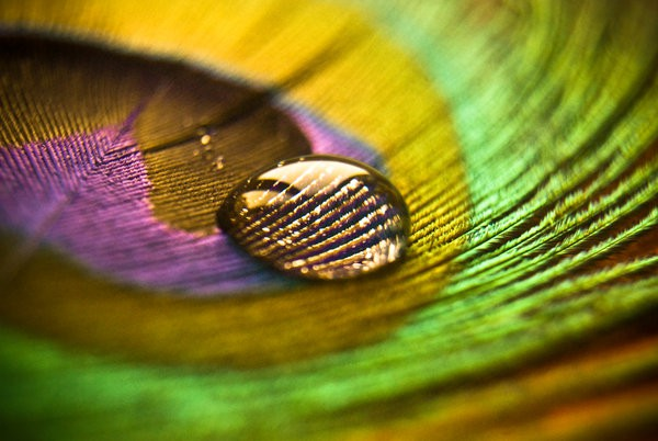 Интерференция на перьях павлина